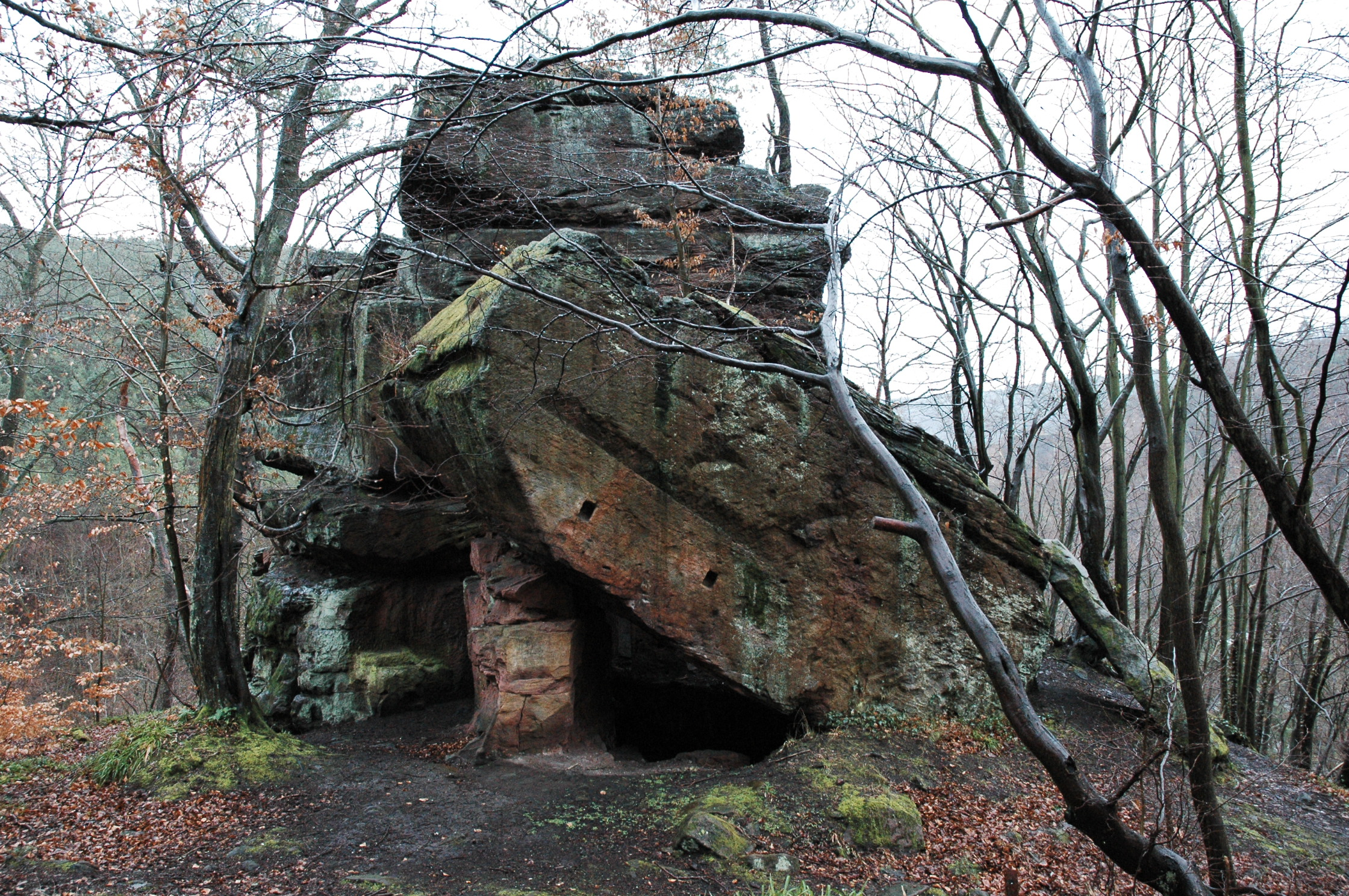 Ruine der "Klause" Nonnenfels